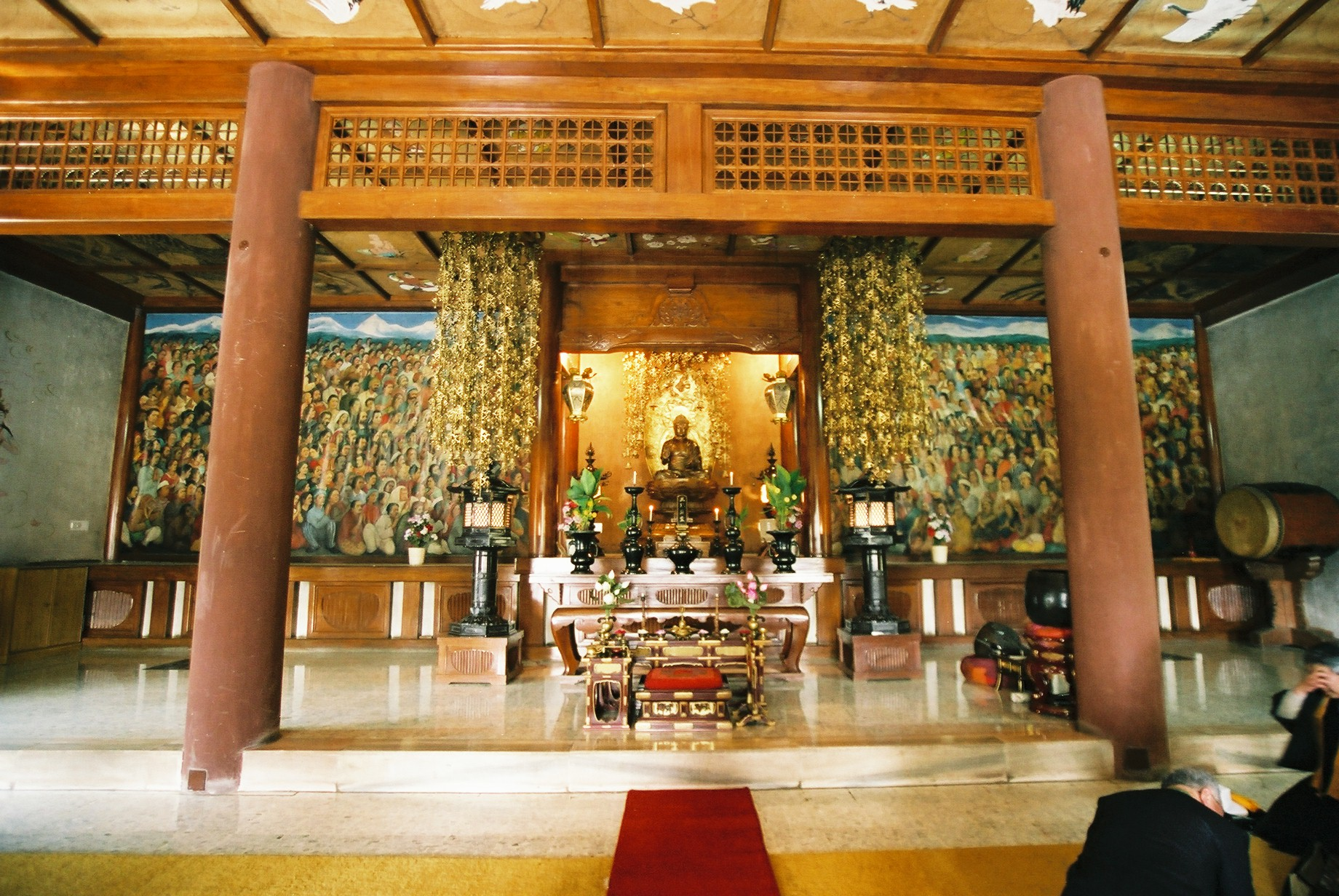 日本寺本堂の内陣 やはりここは日本のお寺でした。(妙に落ち着きます。(笑) ) (2005/01/26 Buddha Gaya, Bihar, INDIA)